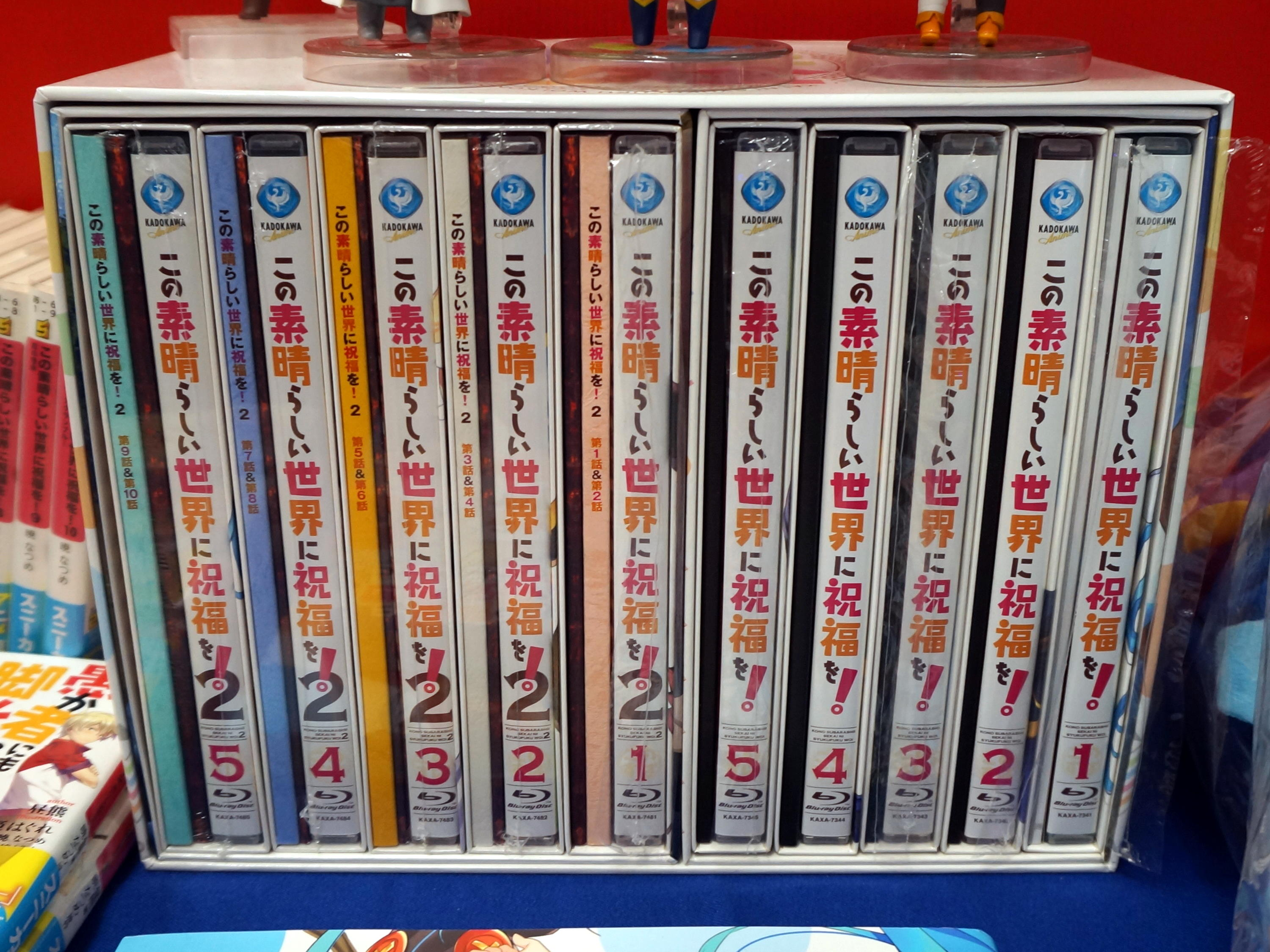 巴哈姆特電玩資訊站22週年站聚，「時代的眼淚 現代的演進」攤位展示的《為美好的世界獻上祝福！》電視動畫日本版BD-BOX。